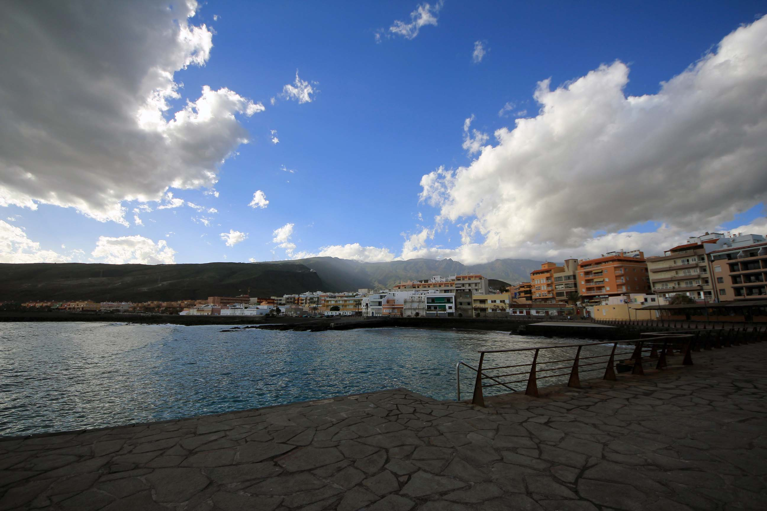 Puerto de Guimar